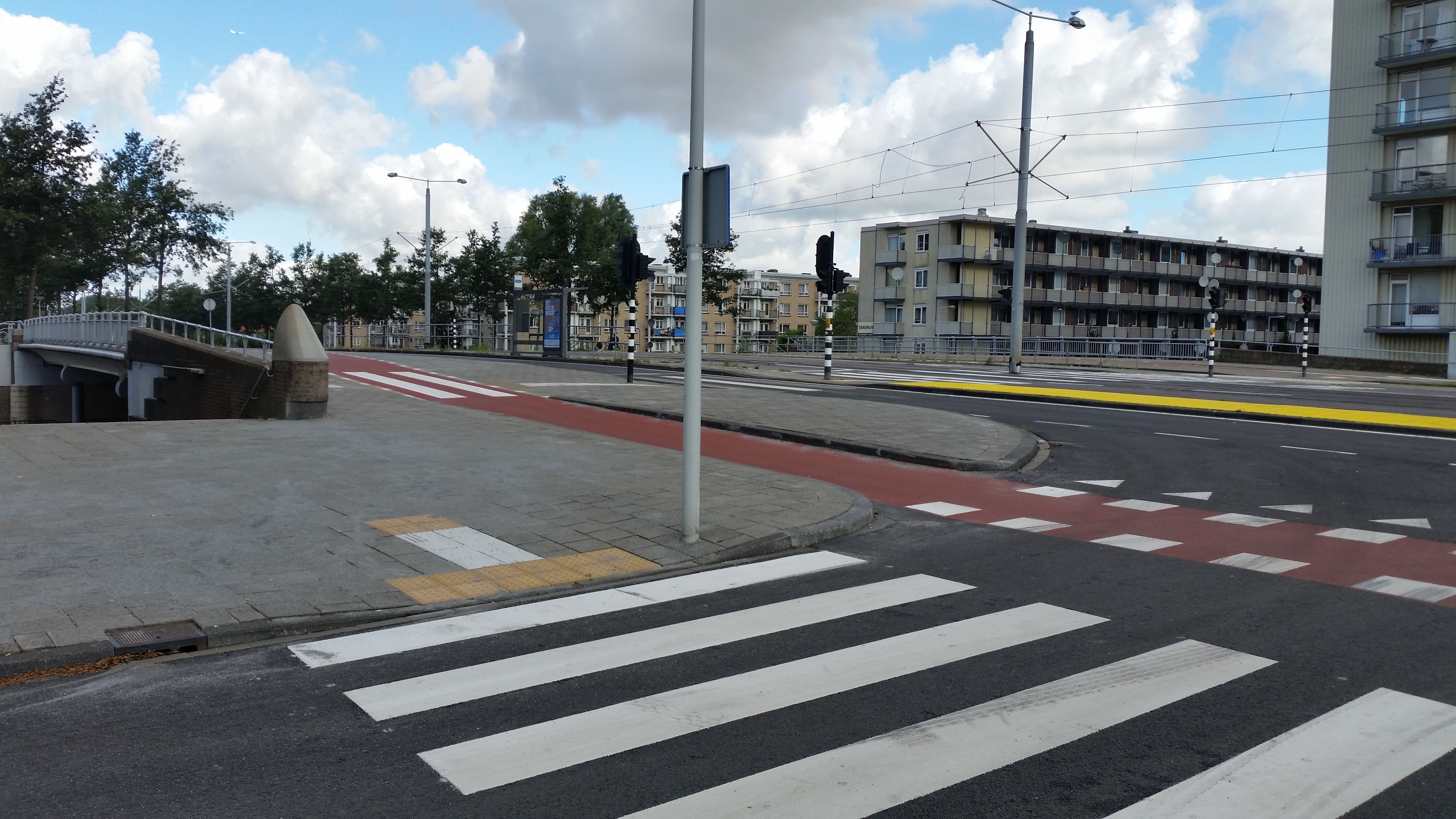 Brug 605 (in Amsterdam), overzicht bovenrijdek